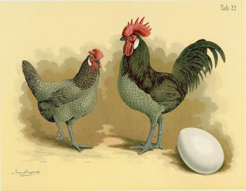 Andalusier-Huhn. Gallus dom. andalusianus. Andalusianus. Andalousien.